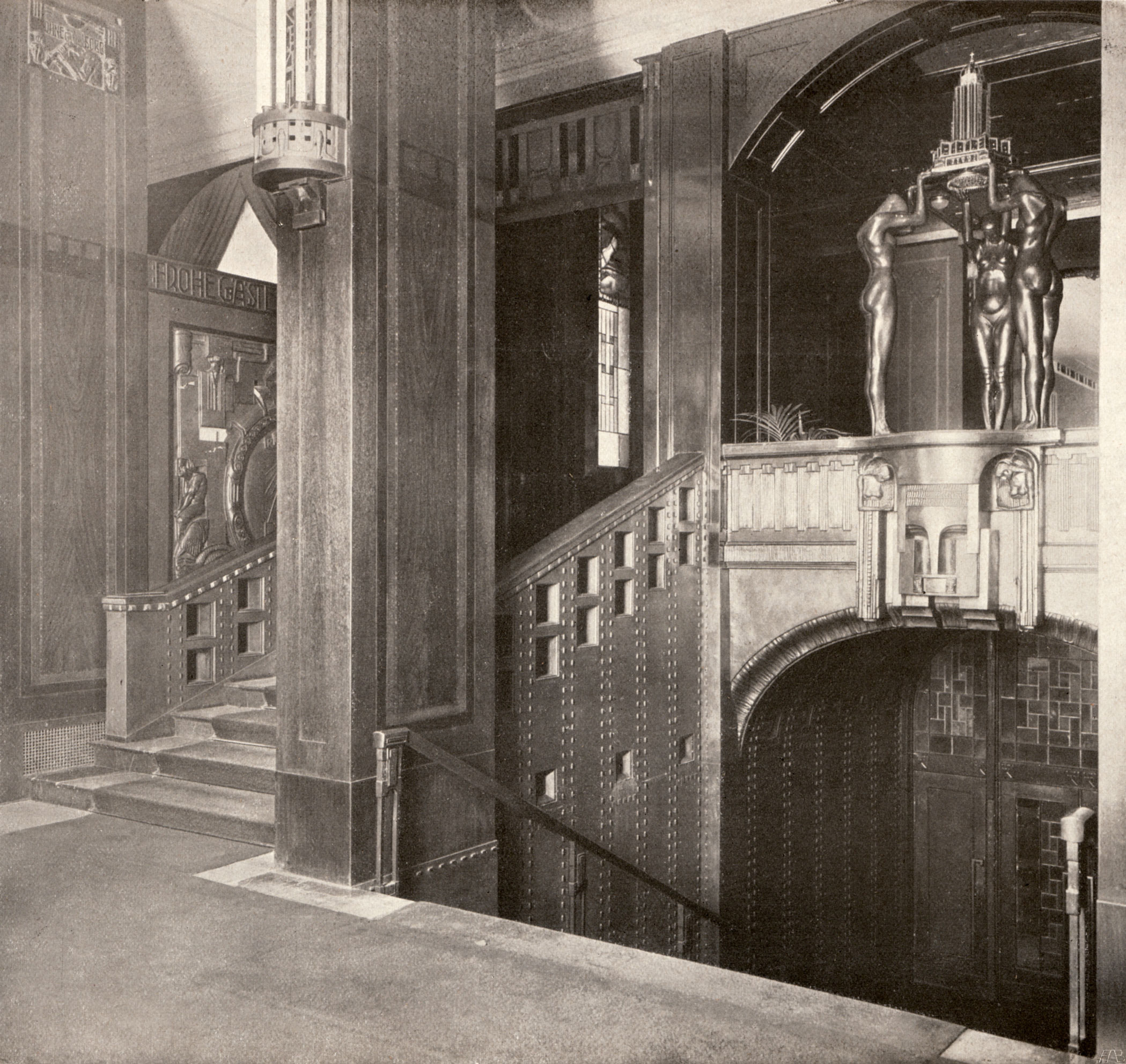 Berlin - Weinhaus Rheingold, Durchgang vom Pfeilersaal im Saalbau an der Bellevuestrasse in den Roten Saal mit dem Rheingoldbrunnen